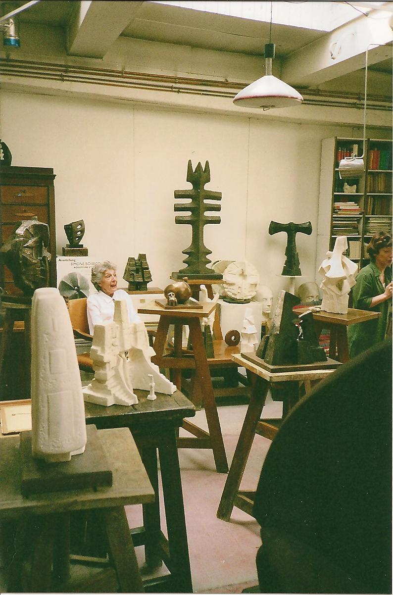 La sculptrice française Simone Boisecq dans son atelier parisien vers 1998.